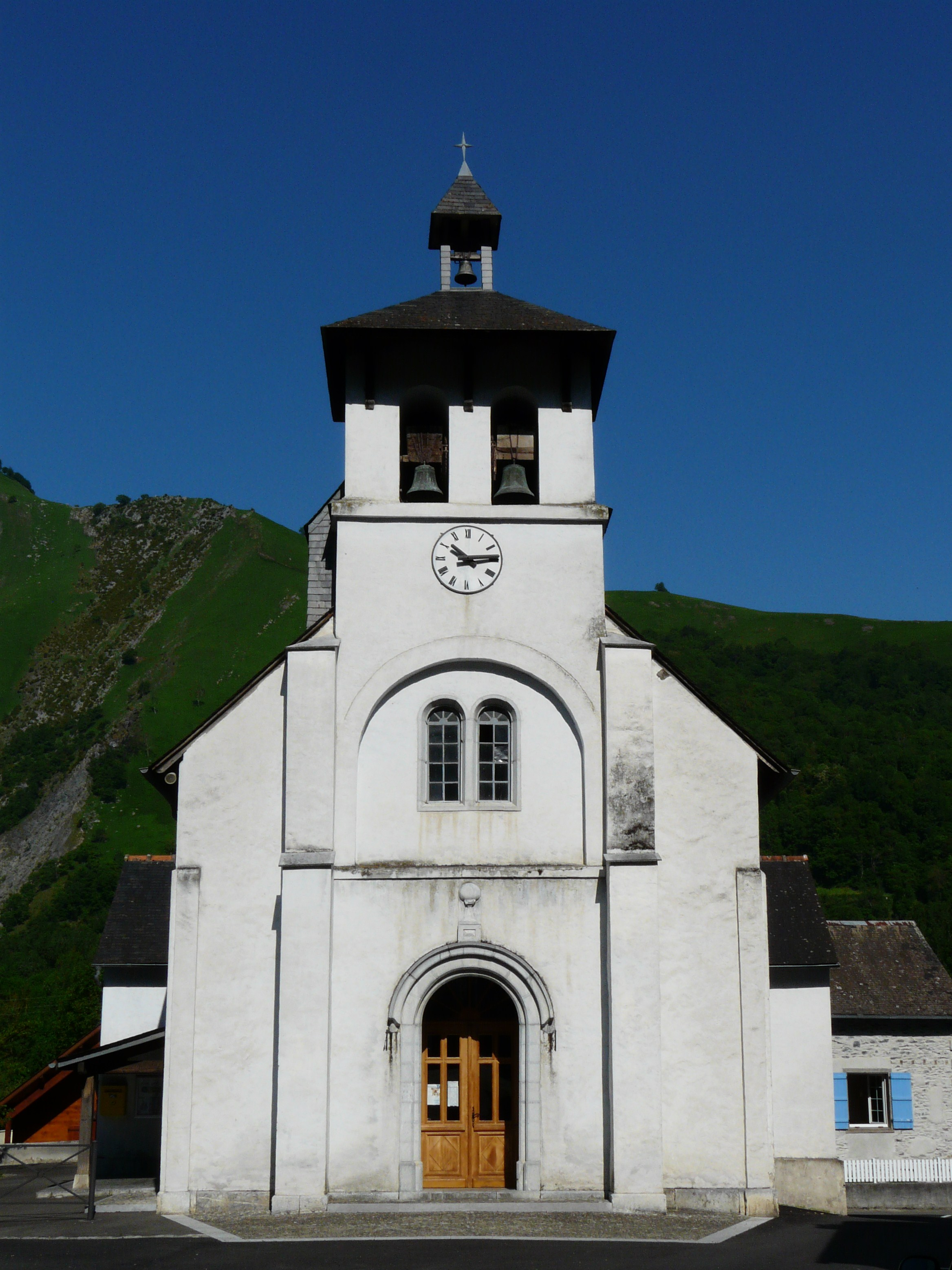 La façade orientale de l'église Saint-Gilles, Ger, Hautes-Pyrénées, France.